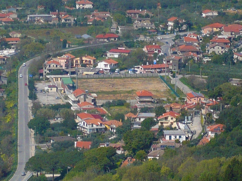 Il campo sportivo comunale Carrano a Santa Maria di Castellabate